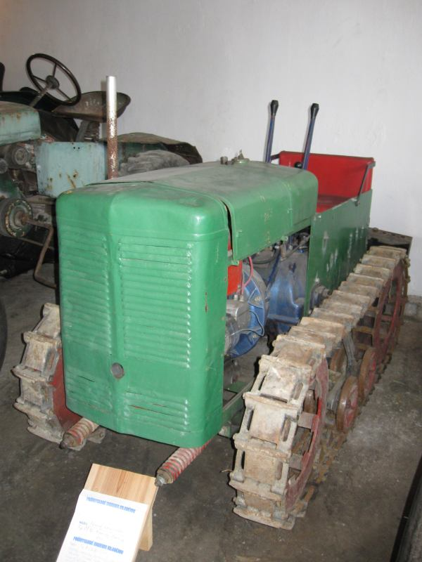 Česky: Pásový minitraktor PT 10. Výrobce Agrostroj Prostějov, r.v. 1954